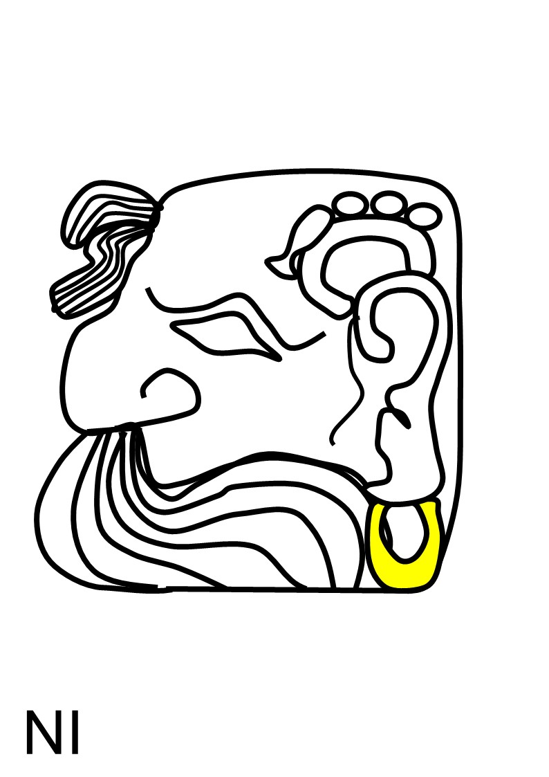 Syllabogramme maya NI